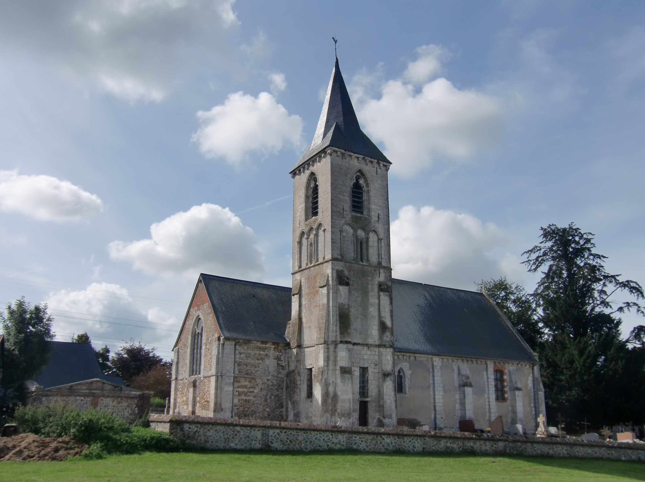 église Saint-Martin d'Eturqueraye (Eure, Normandie, France)